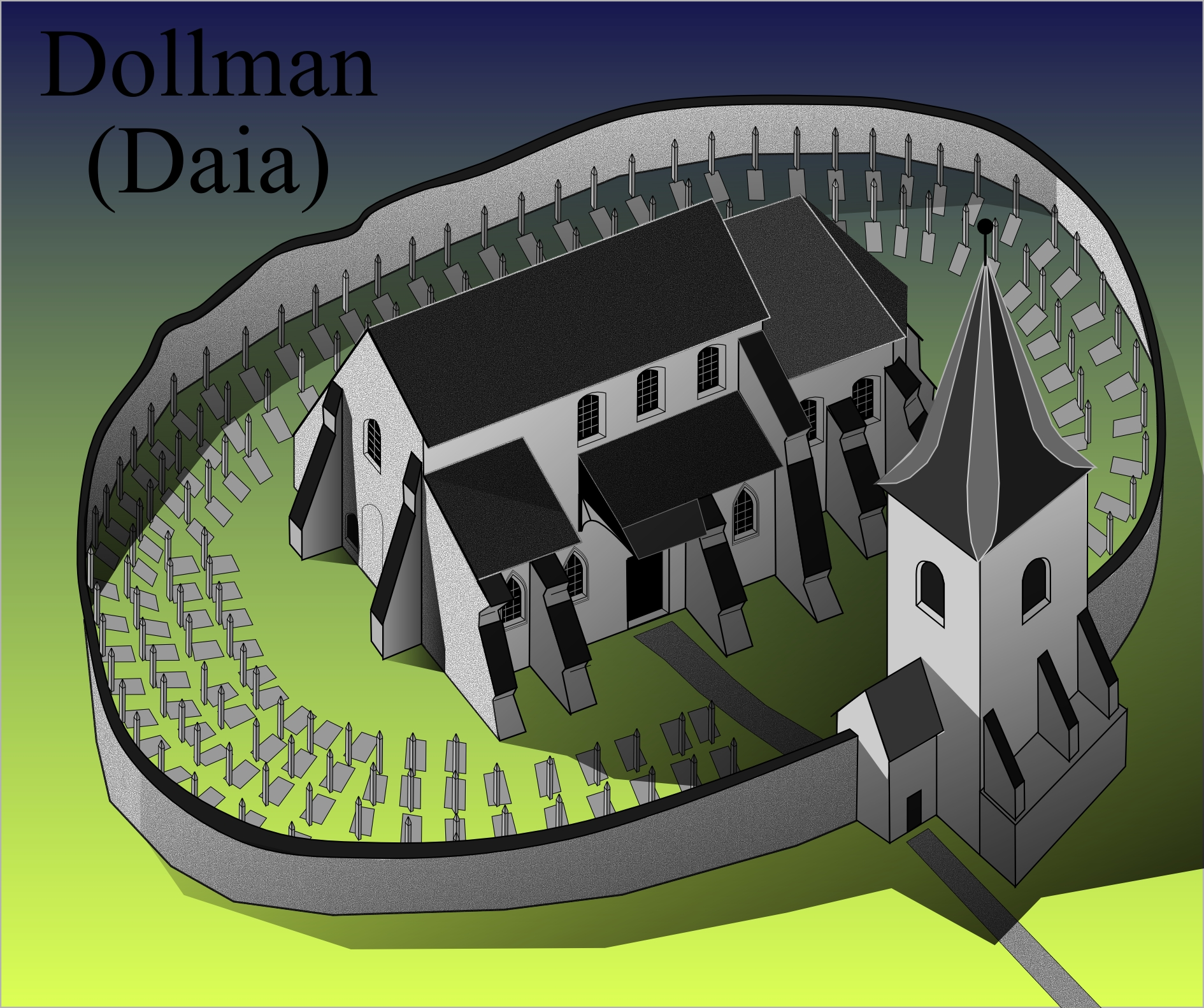 Biserica fortificata din Daia.